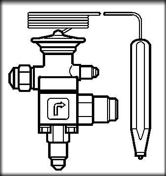 Válvula de expansión termostática con compensación externa tipo TE5 de Danfoss